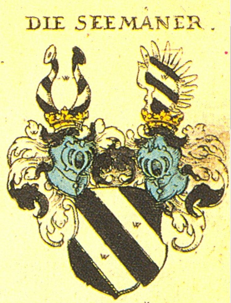 Wappen der Bayerischen Adelsfamilie Seemaner